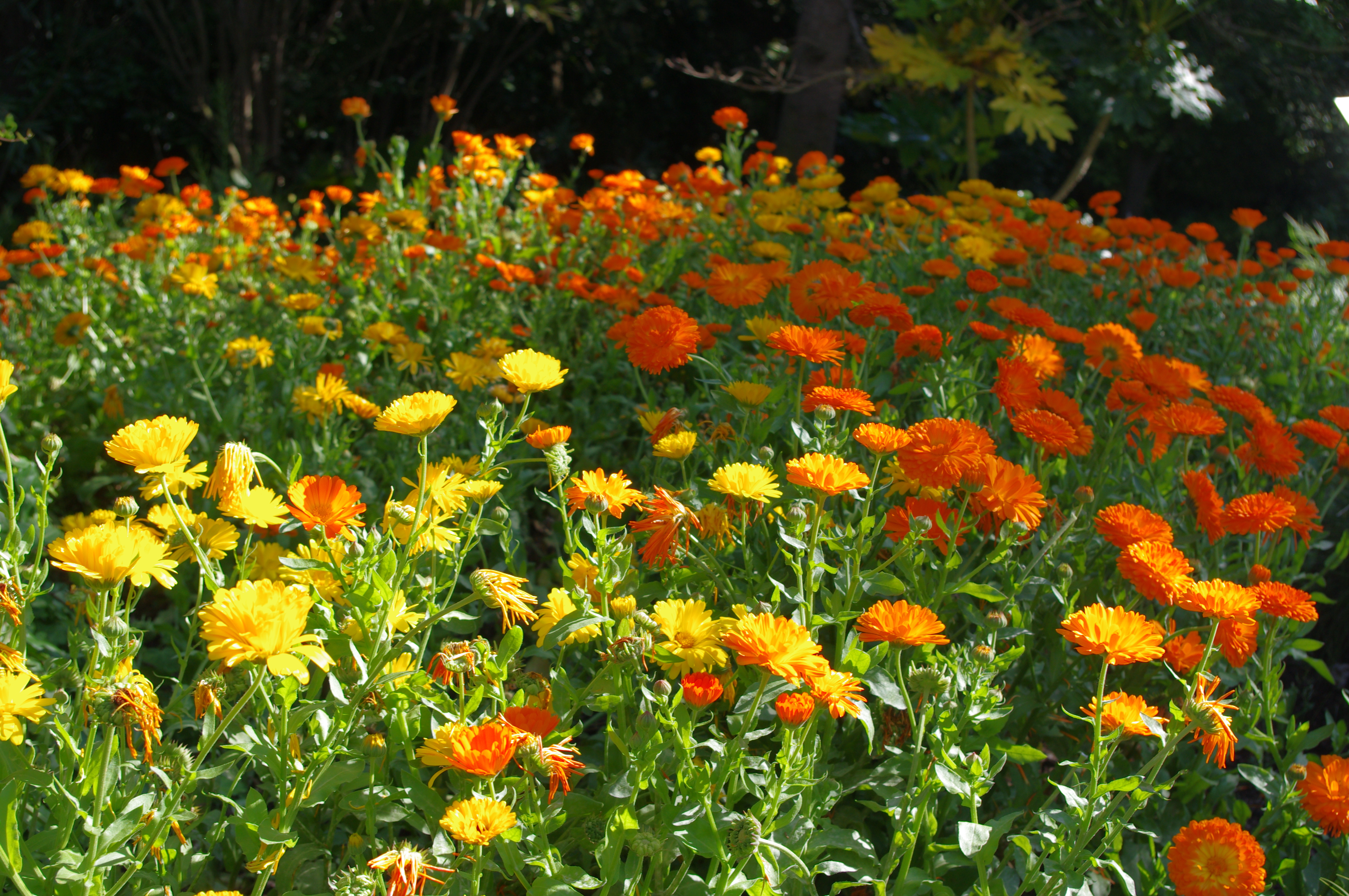 Flors grogues i taronges al Jardí botànic Marimurtra, de Blanes.